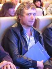 Maiorga Ramírez político español.